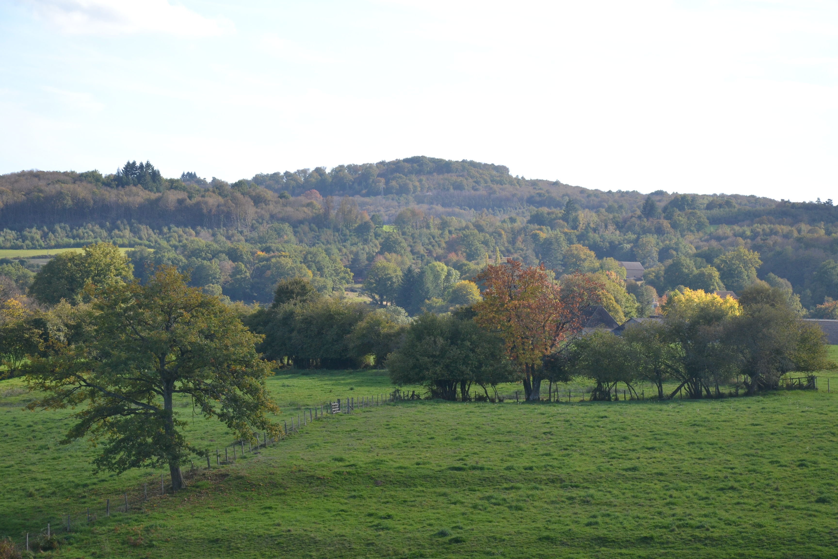 Le puy de Bar (534 m.), commune de Château-Chervix (Haute-Vienne, France).